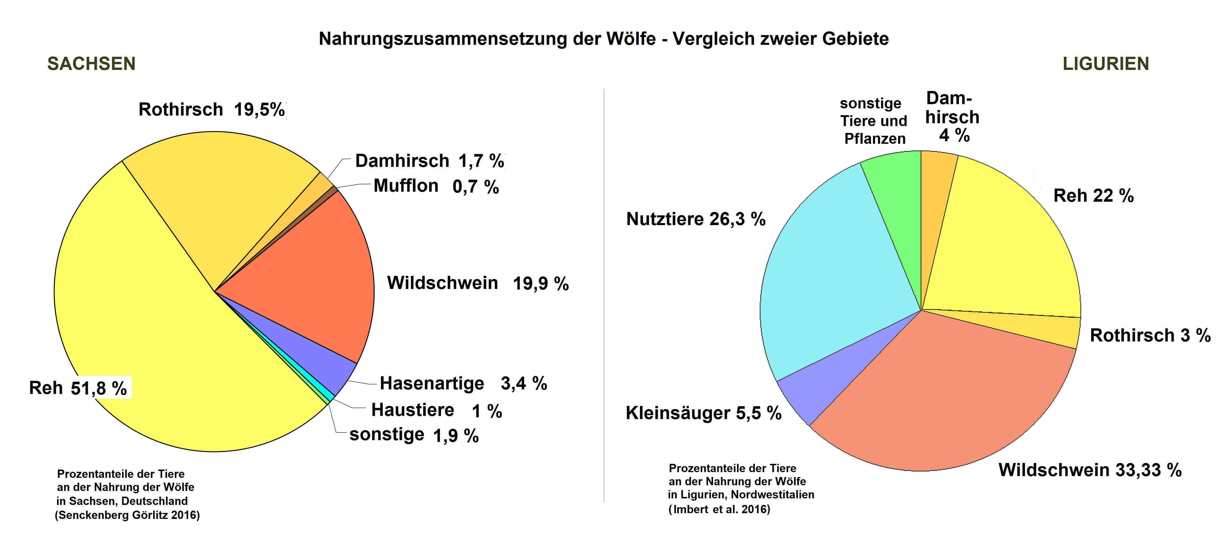 Nahrungszusammensetzung von Wölfen in verschiedenen Gebieten: Lausitz und Ligurien